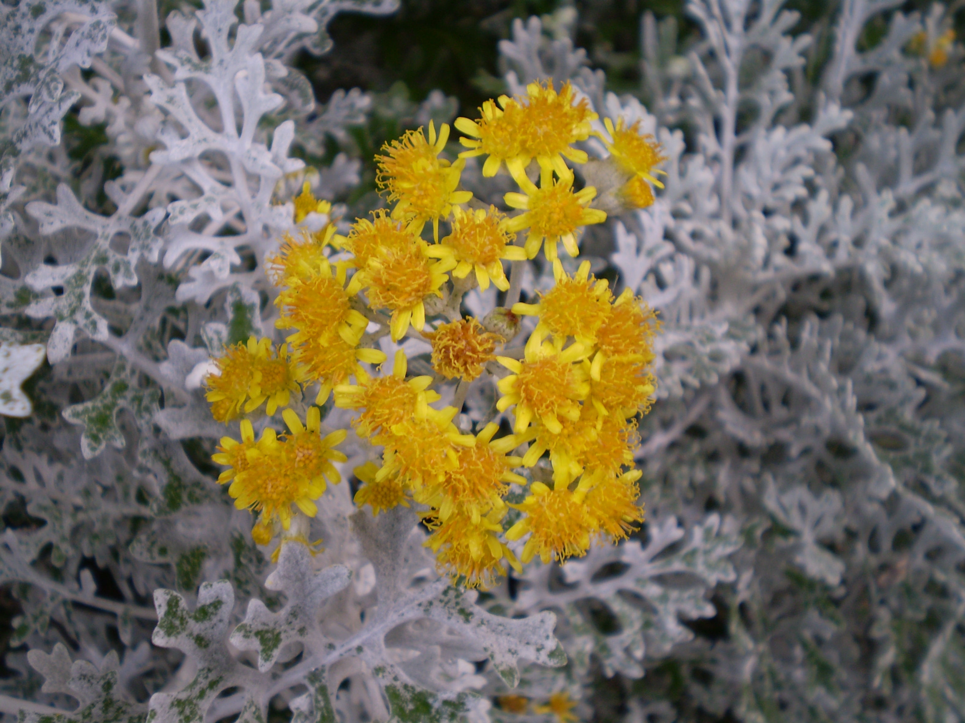 Jacobaea maritima/Senecio bicolor Silverdust/zilverblad